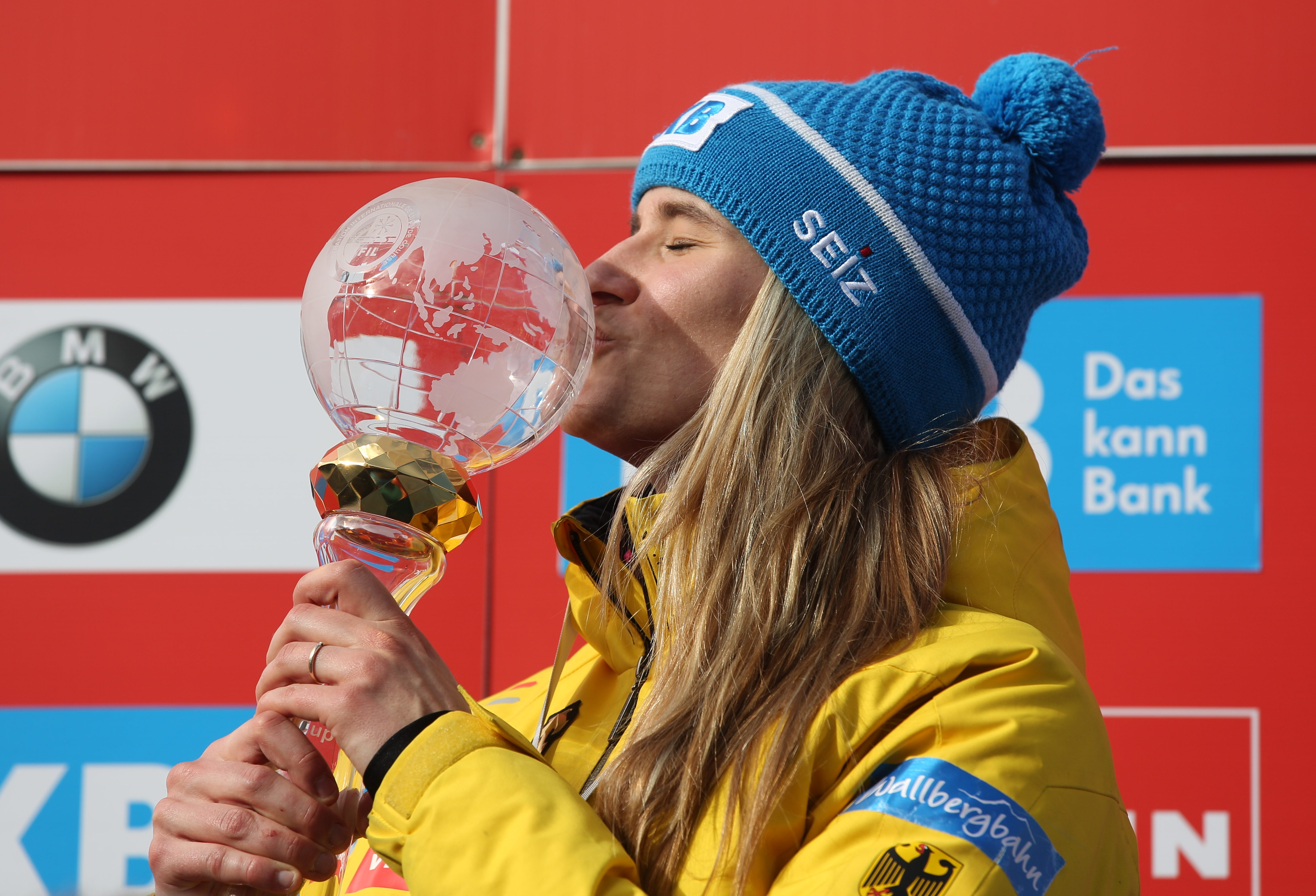 Natalie Geisenberger mit der Glaskugel für die Gesamtweltcupsiegerin bei der Siegerehrung beim Rennrodel-Weltcup in Altenberg 2017